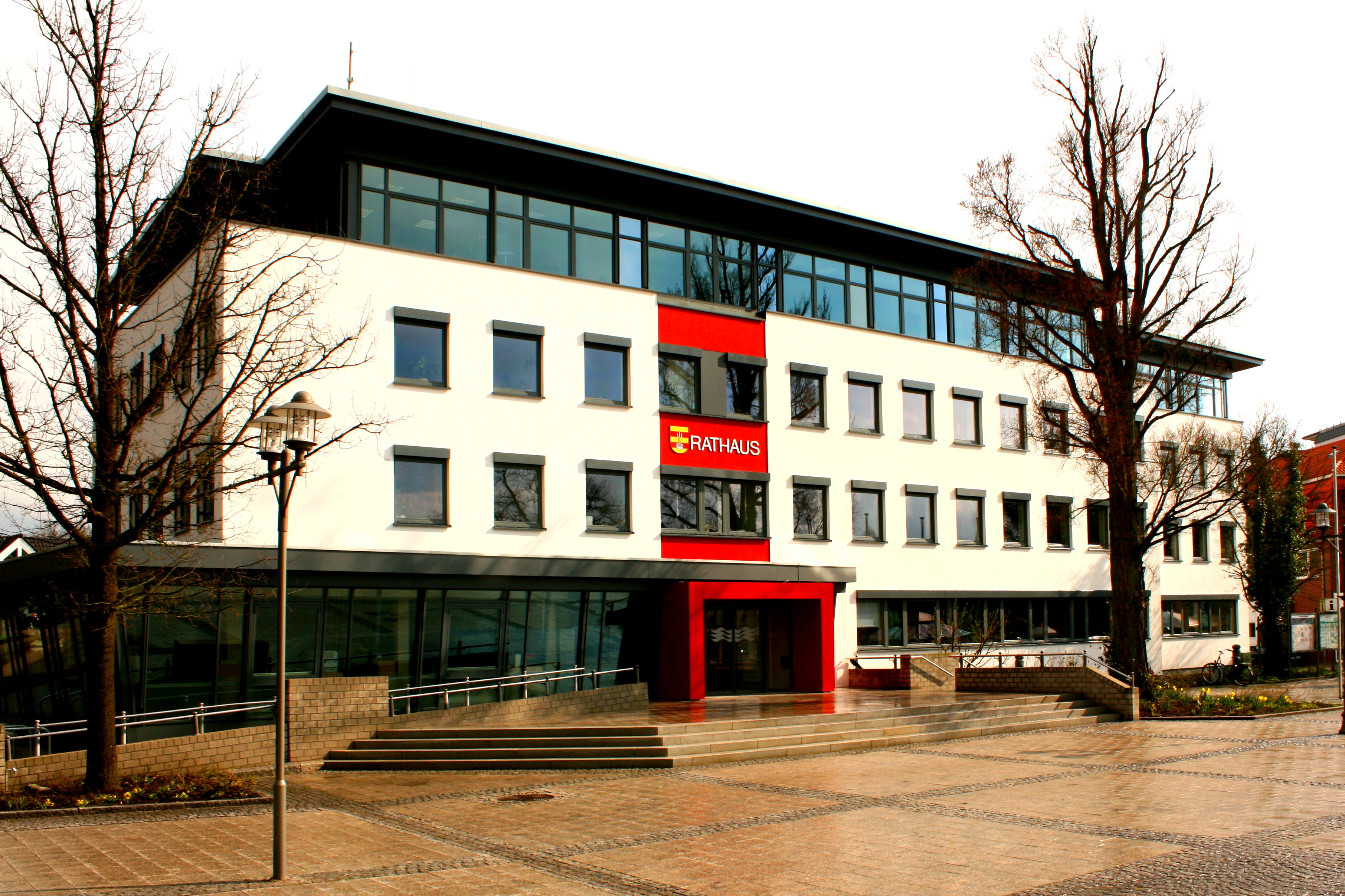 Rathaus Bad Zwischenahns nach Renovierung und Umbau